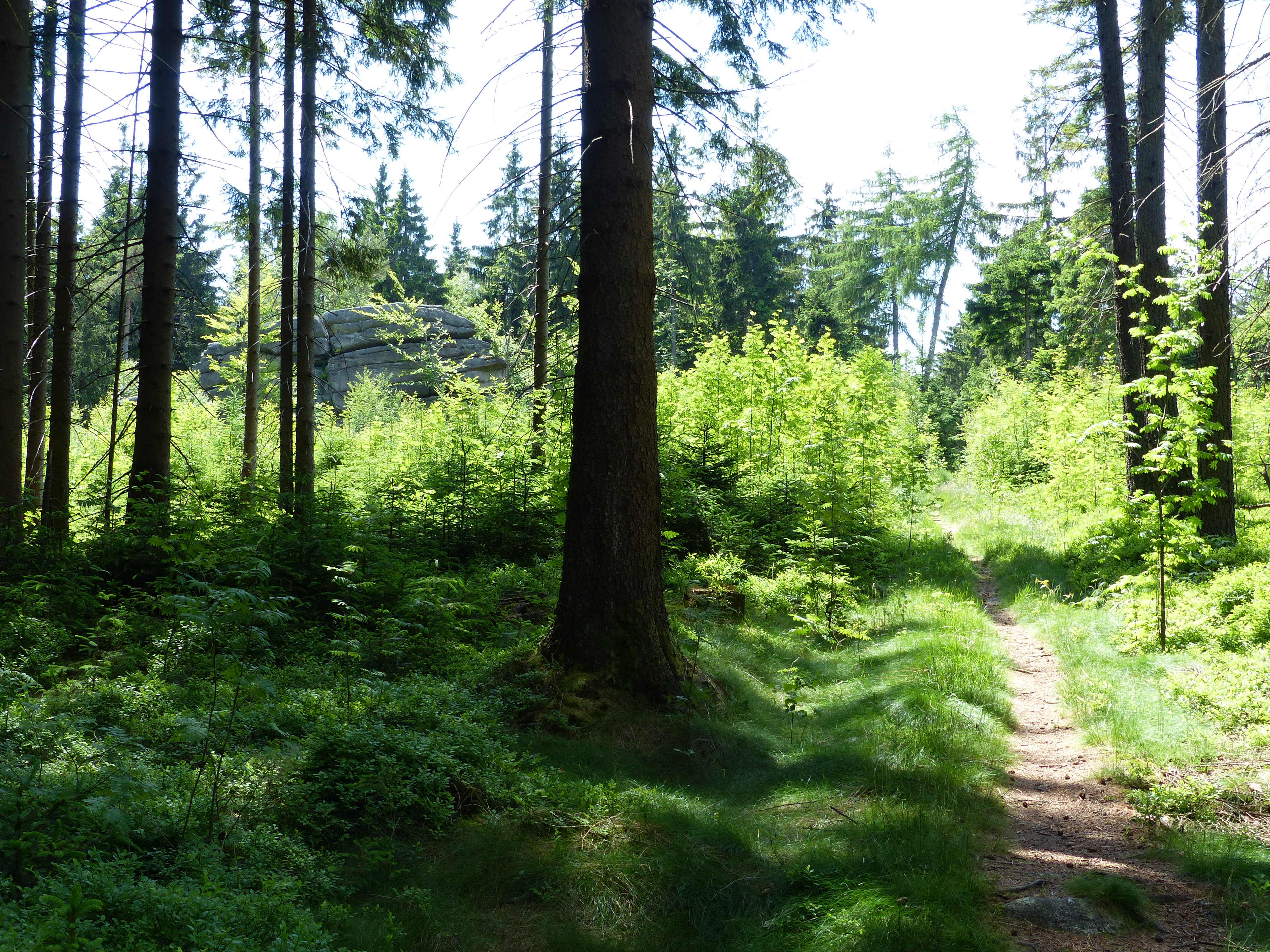 Zellerfels, Geotop am Großen Waldstein im Fichtelgebirge